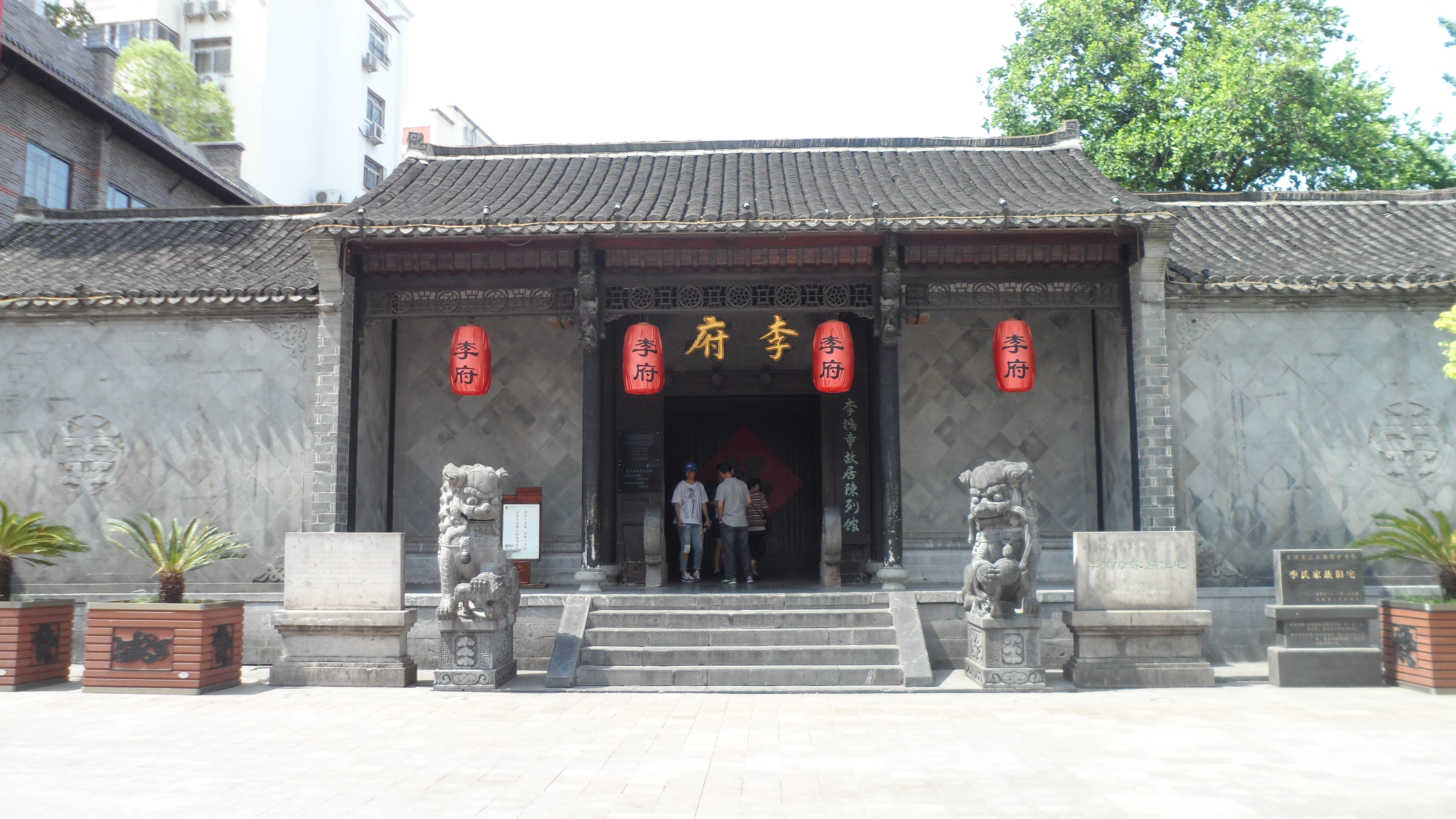 Former Residence of Li Hongzhang